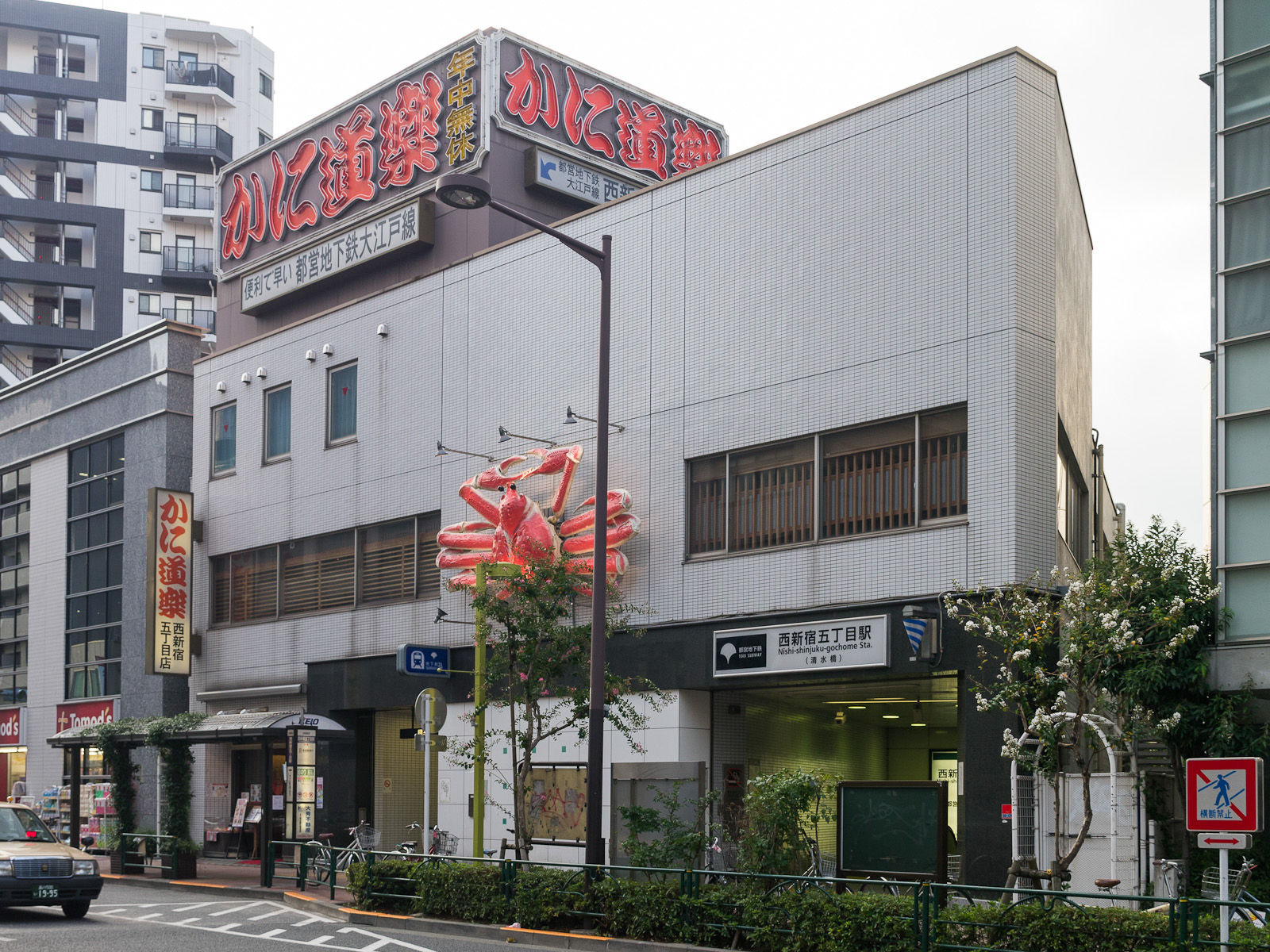 都営大江戸線西新宿5丁目駅。